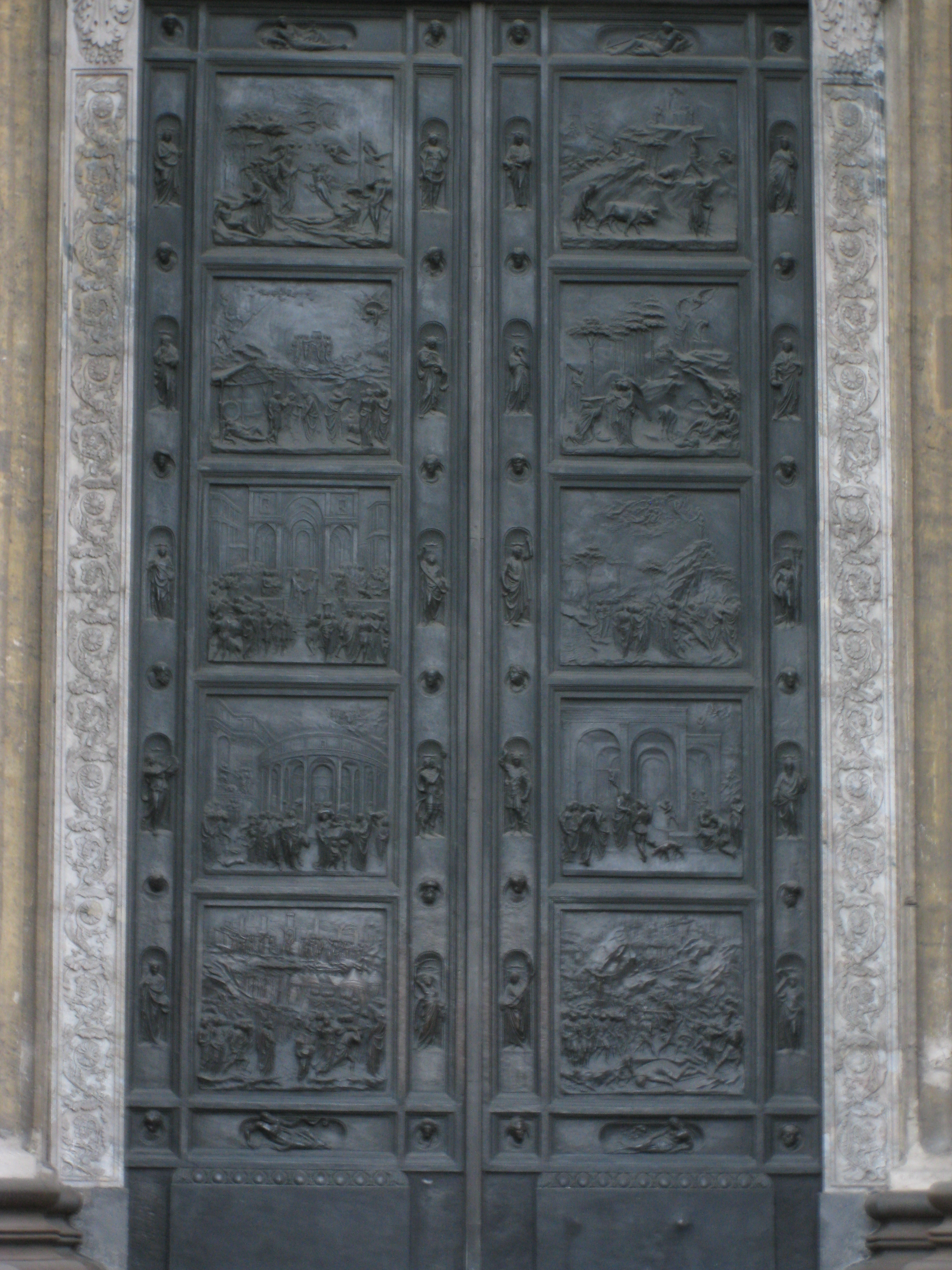 Kazan Cathedral The Gates of Paradise קתדרלת קזן שערי גן העדן בחזית הקתדרלה